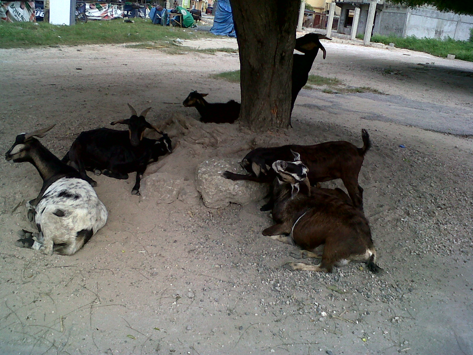 La Punta Pescadora, San Pedro de Macorís.